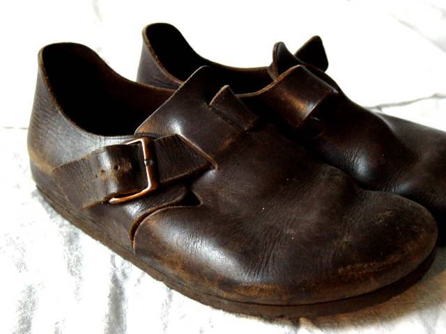 Birkenstockschuhe.